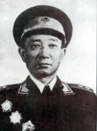 孙继先将军1955年受勋照